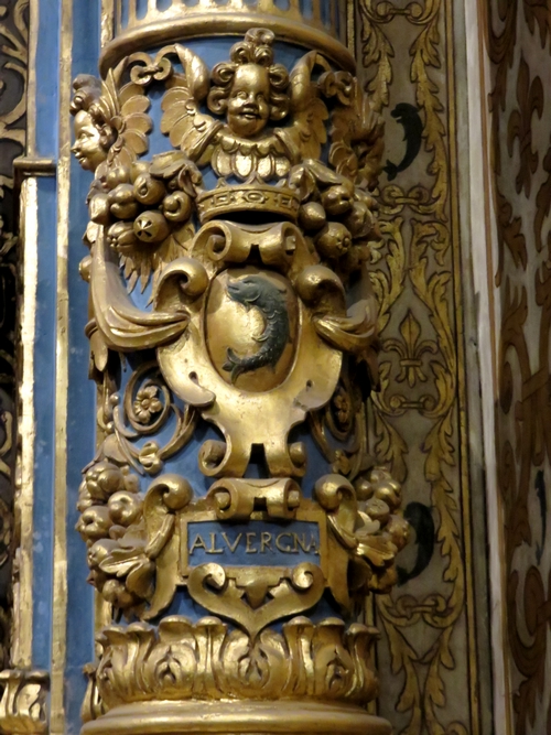 Blasonnement sur un pilier de la chapelle de la Langue d'Auvergne, Co-cathédrale Saint-Jean de La Valette